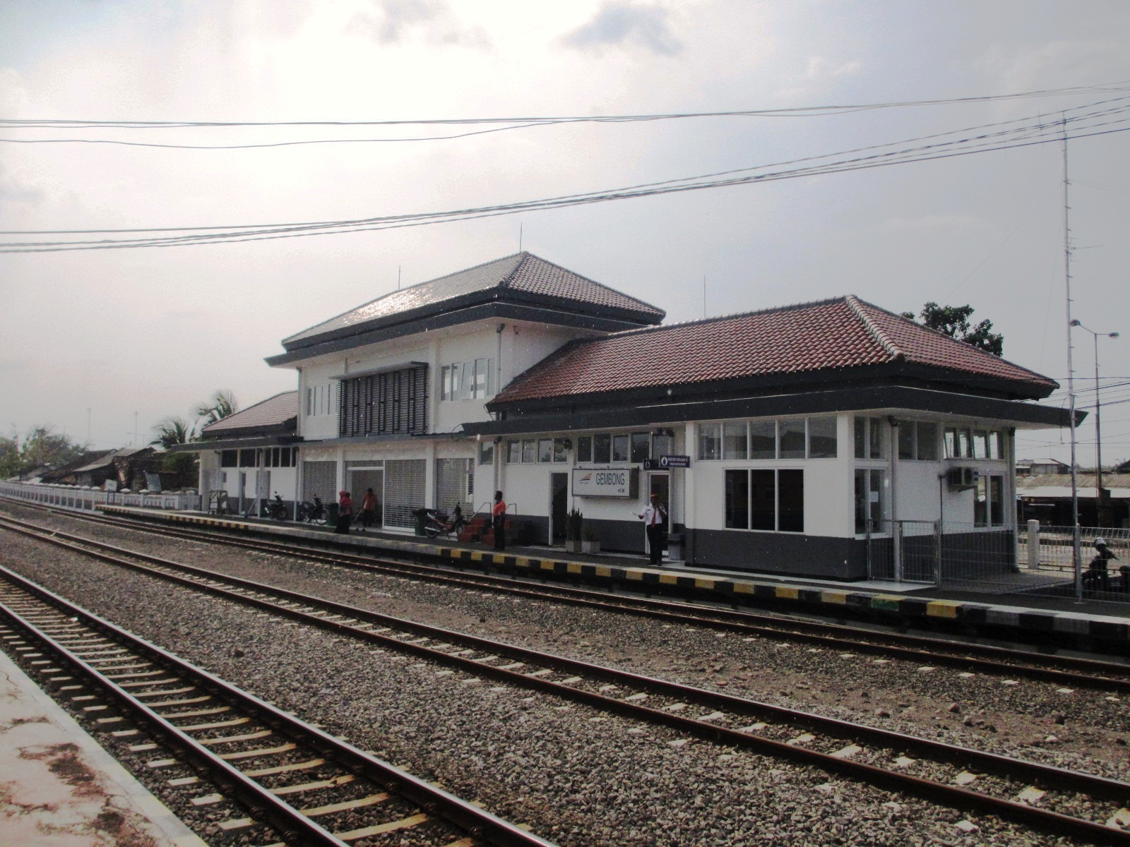 Bangunan baru Stasiun Gembong, Lamongan.